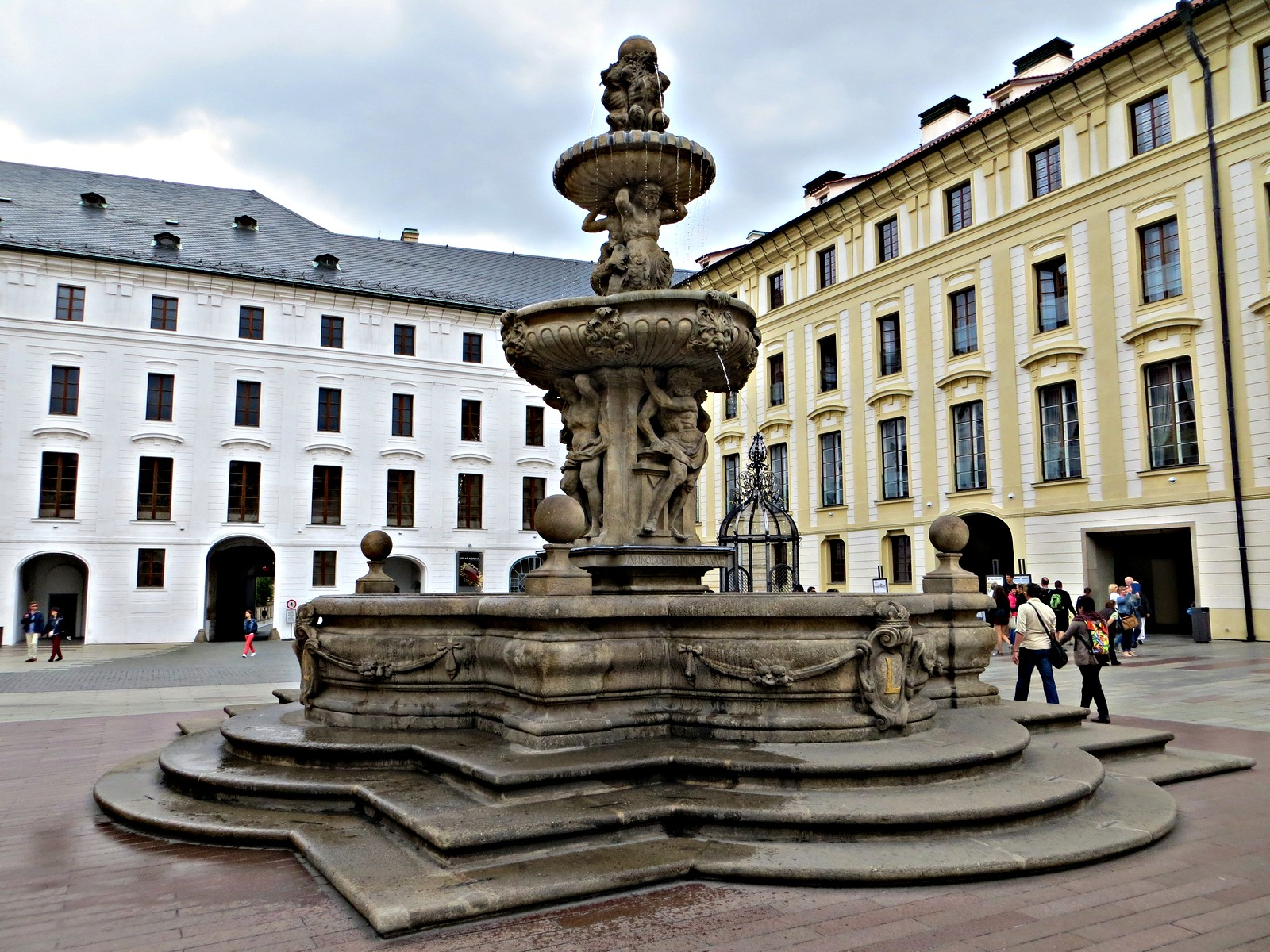 Kohlova kašna